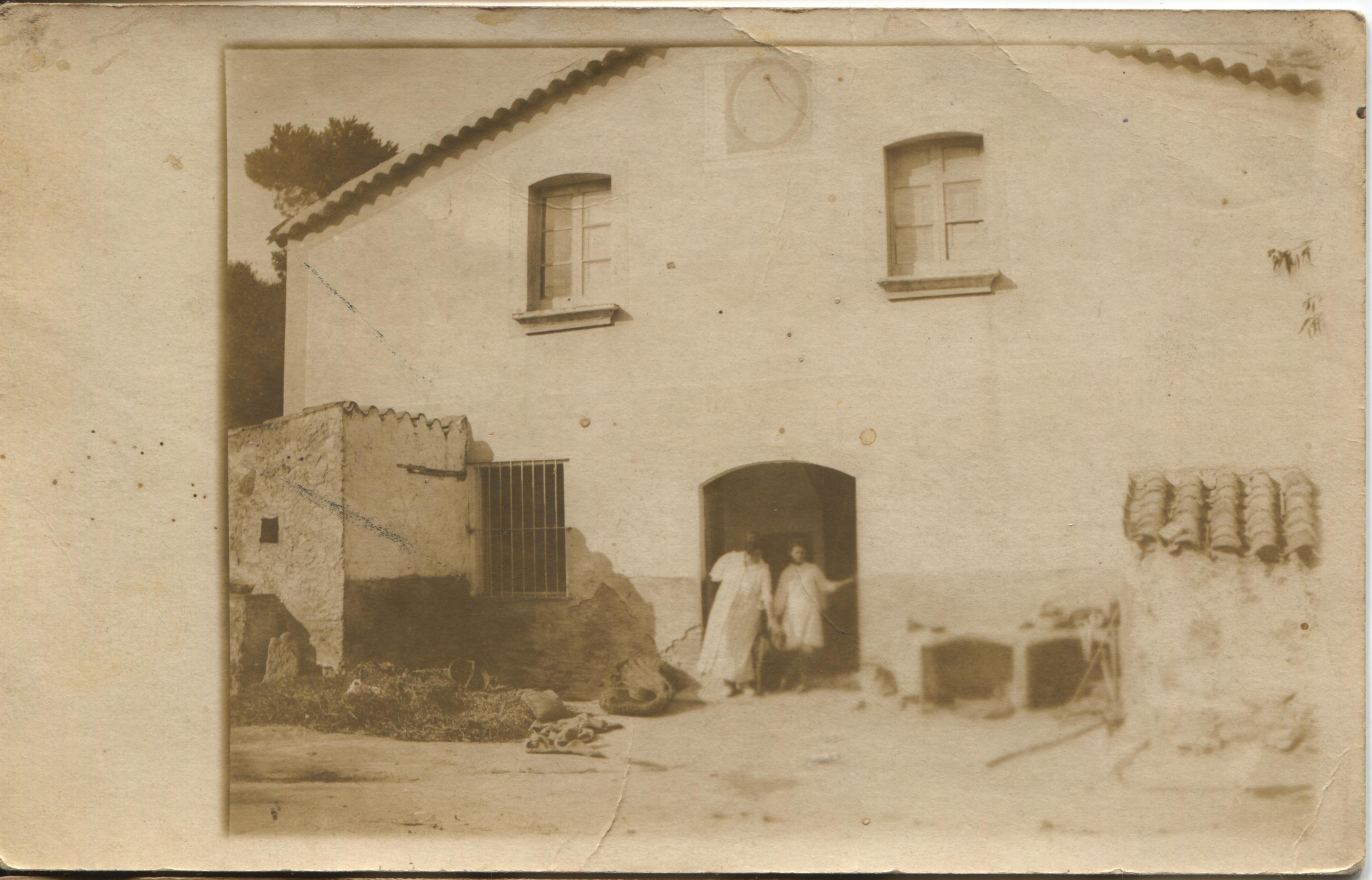 Façana principal de la Casa Paret, o Can Genís Peret, a Vallromanes. Fotografia presa al octubre de 1917.